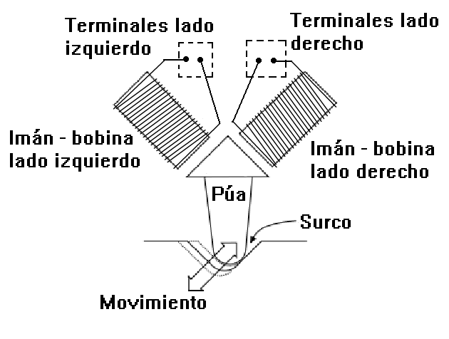 Imagen explicativa del funcionamiento de la capsula y púa de un tocadiscos.